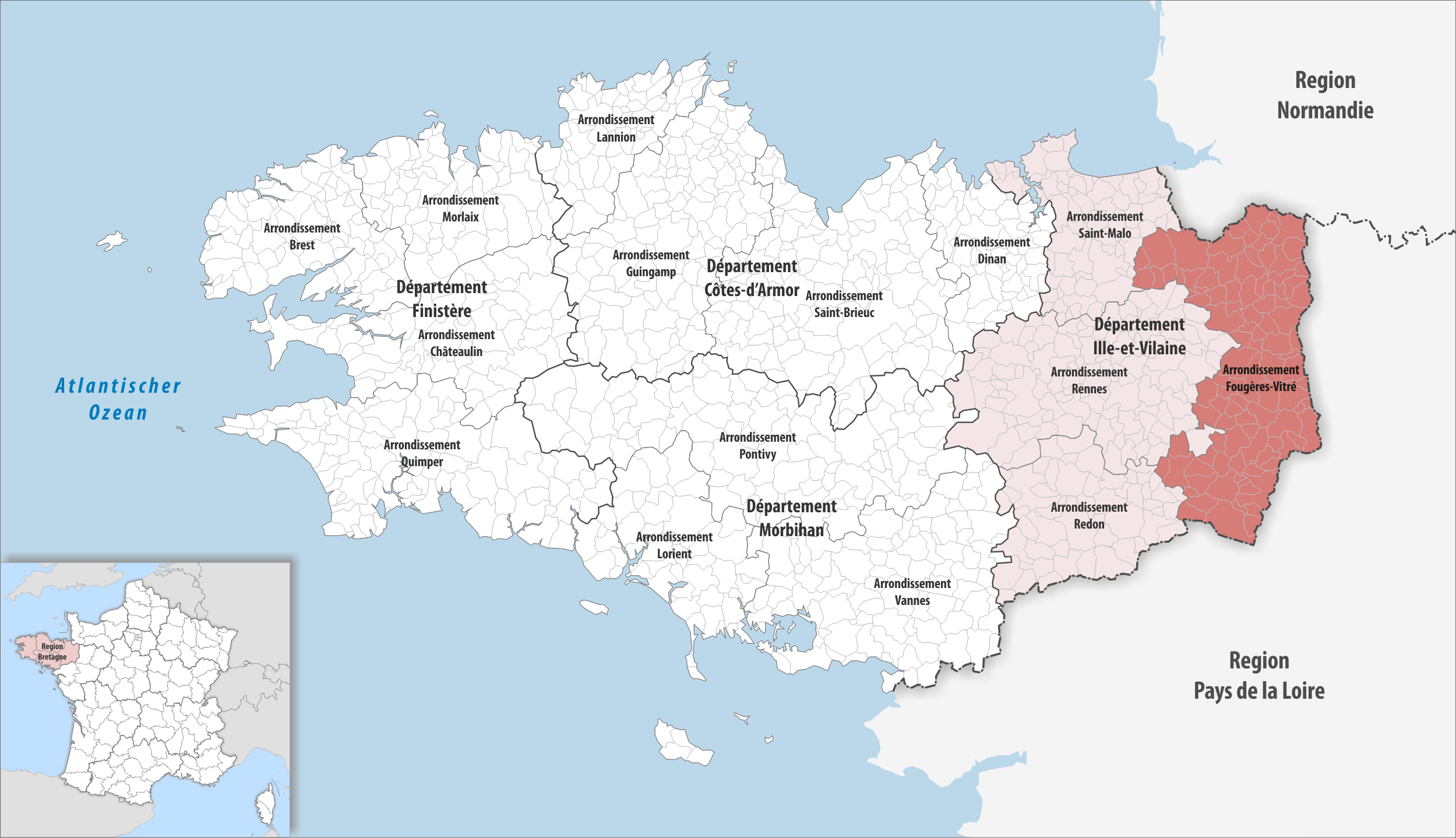 Lage des Arrondissements Fougères-Vitré